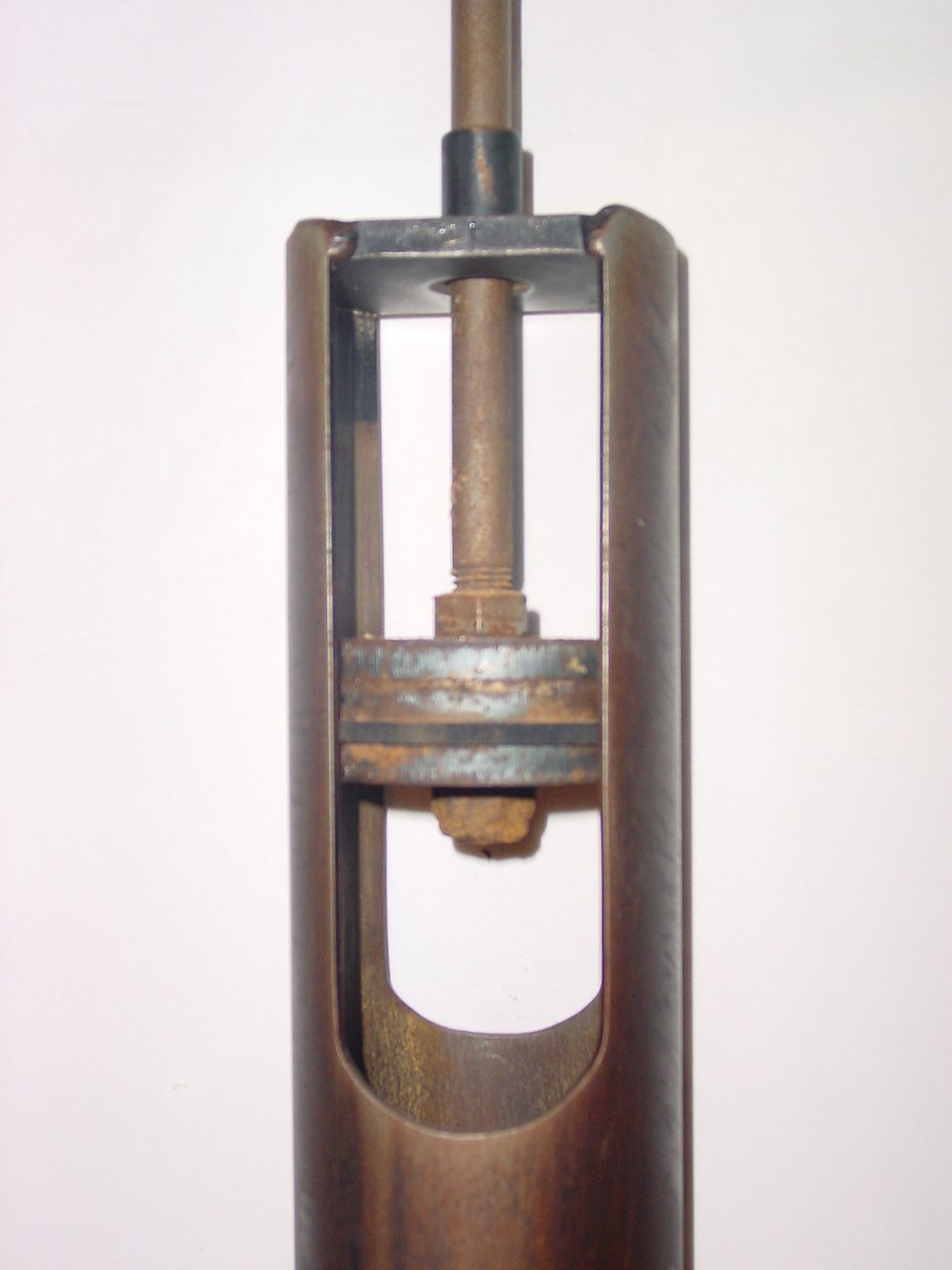 Kiespumen - Durchmesser: 102mm Leergewicht: ca. 9kg Gesamtlänge: ca. 1700mm